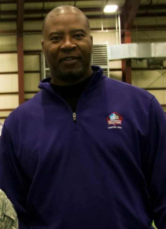 L'ex DE/LB dei Minnesota Vikings, Atlanta Falcons e San Francisco 49ers Chris Doleman